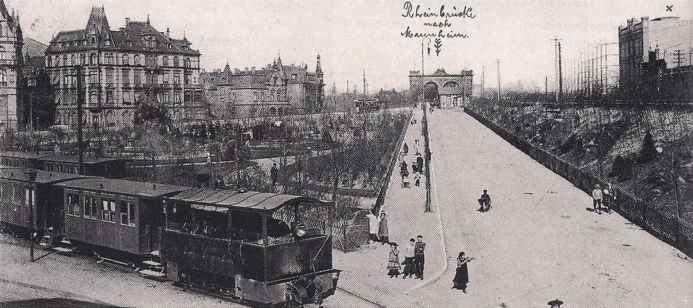 Lokalbahnlok FRIESENHEIM um 1900 am Ludwigshafener Jubiläumsbrunnen beim Kleinbahnhof Ludwigshafen Brücke